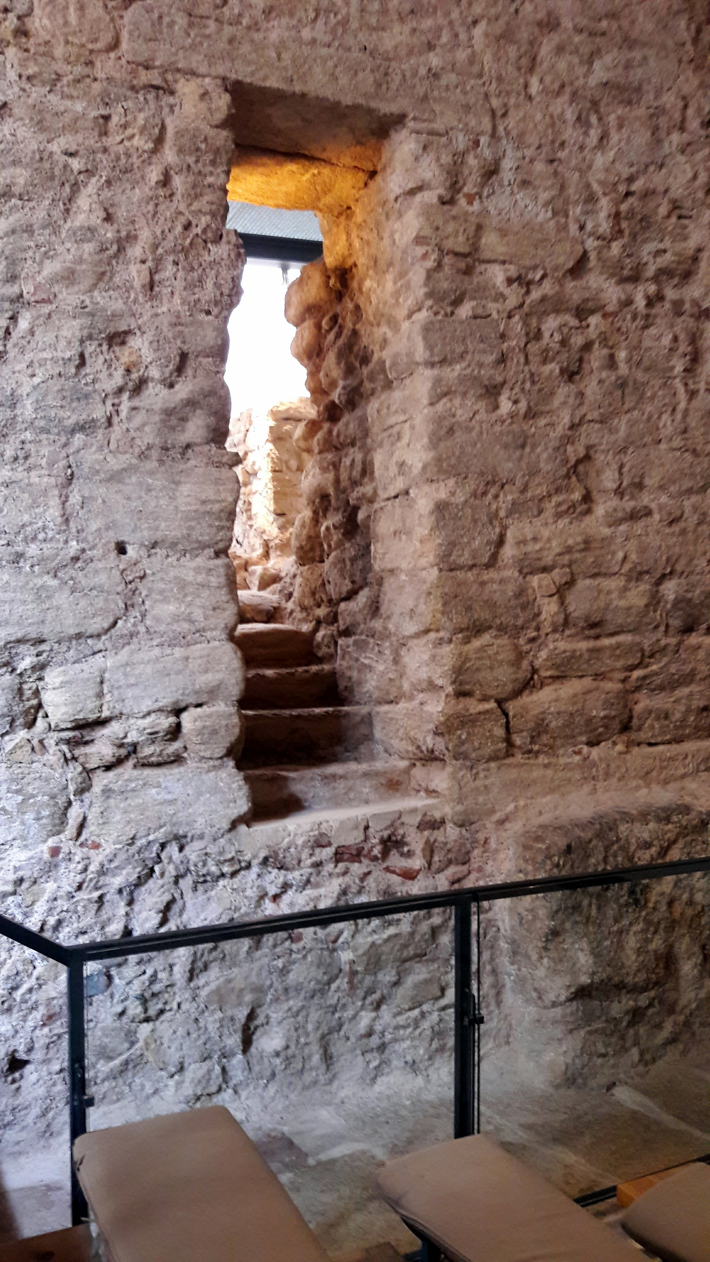 Museo Arqueológico Los Baños-zona común